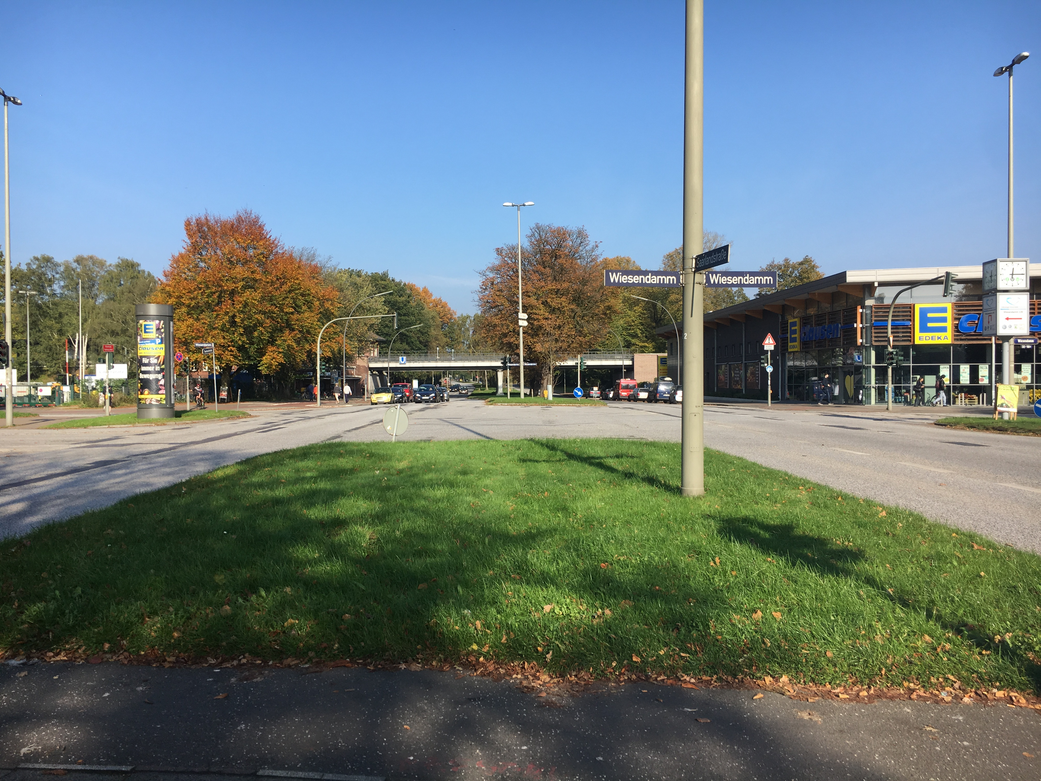 Saarlandstraße, Blick in Richtung City Nord, mittig die Bahn-Brücke der Linie U 3, direkt links anschließend der Bahnhof Saarlandstraße